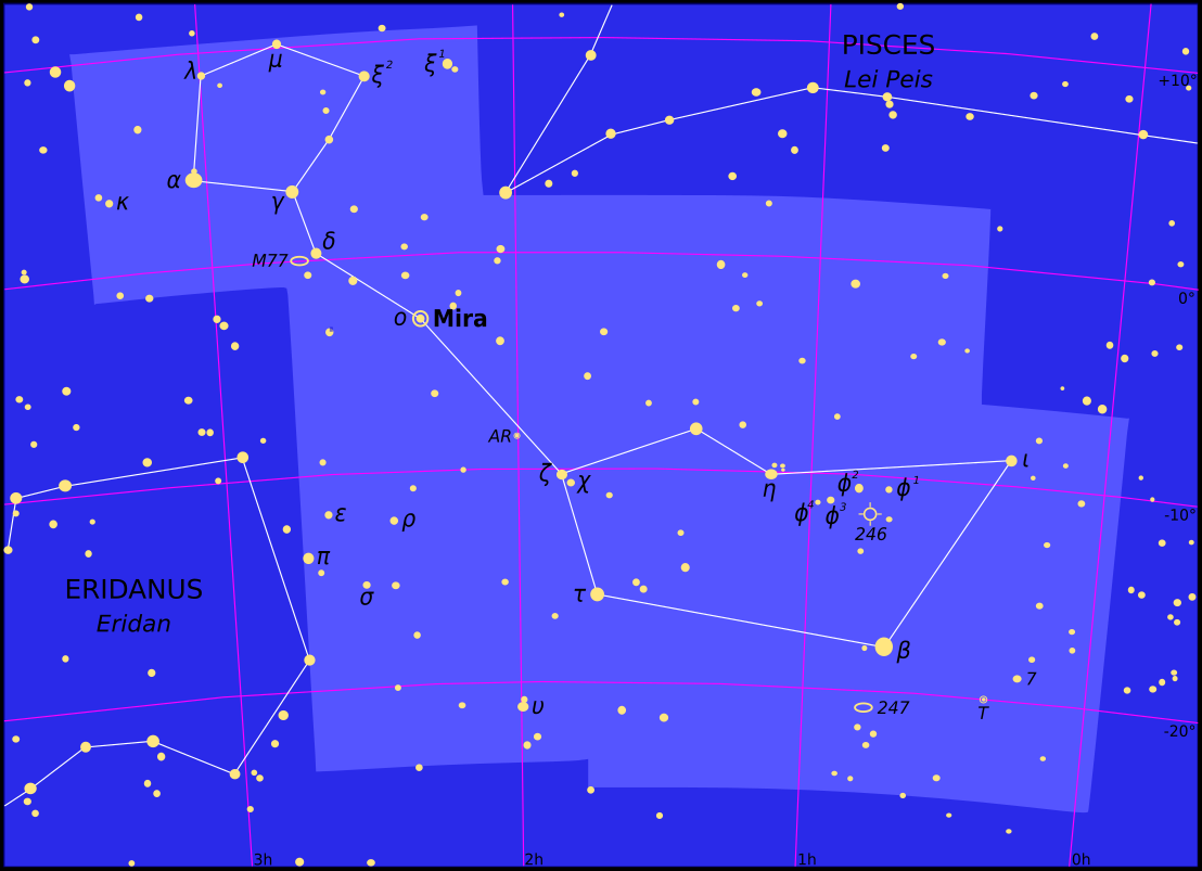 Constellacion de la Balena.